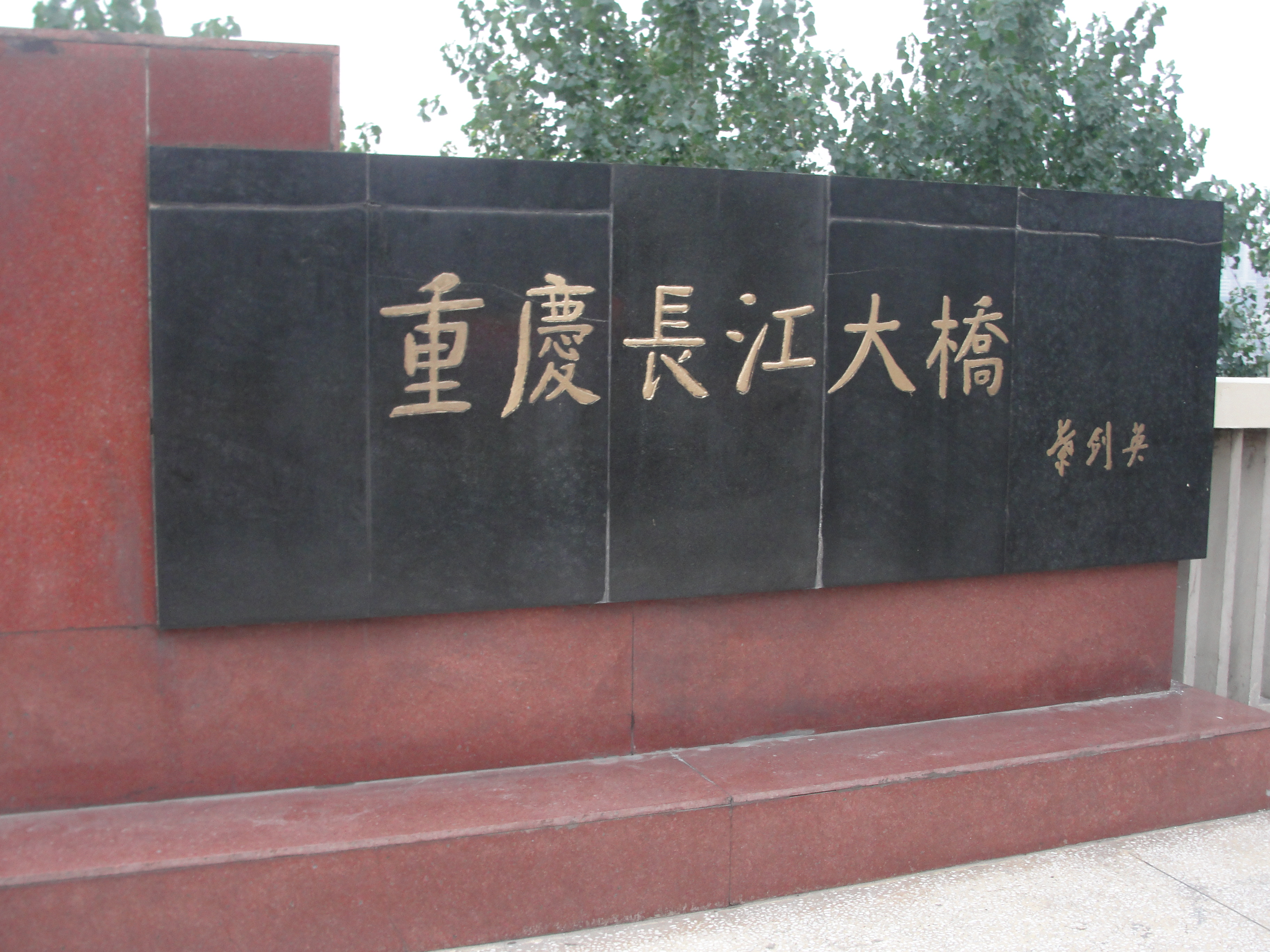 重庆主城区第一座跨越长江的桥梁，由叶剑英题字